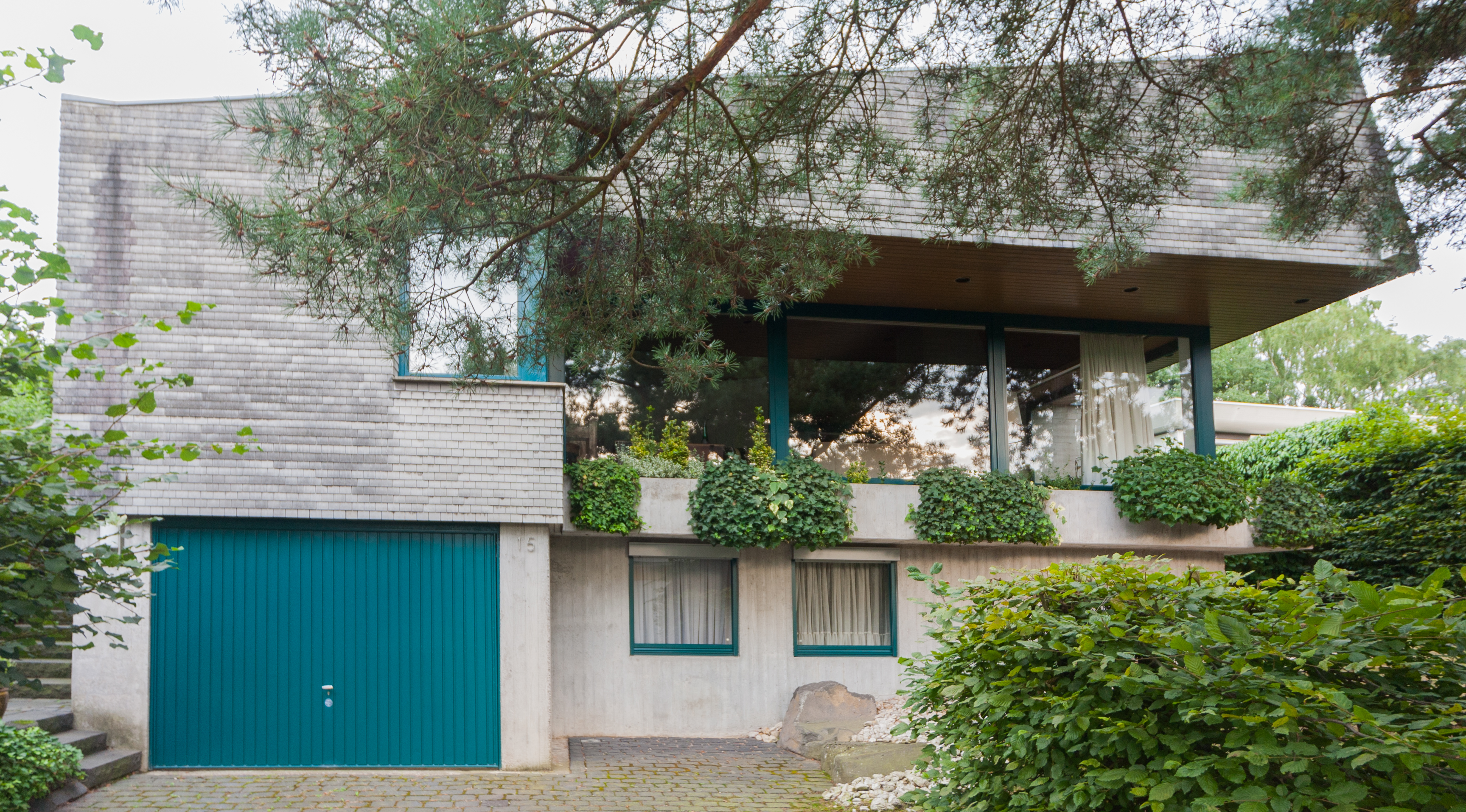 Alexander-Koenig-Straße 15, Bonn-Poppelsdorf